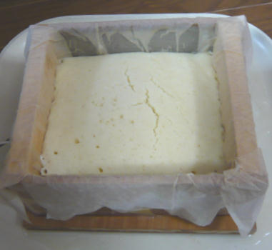 岩城正夫氏収蔵品の電気パン焼き機で作った、出来立ての電気パン